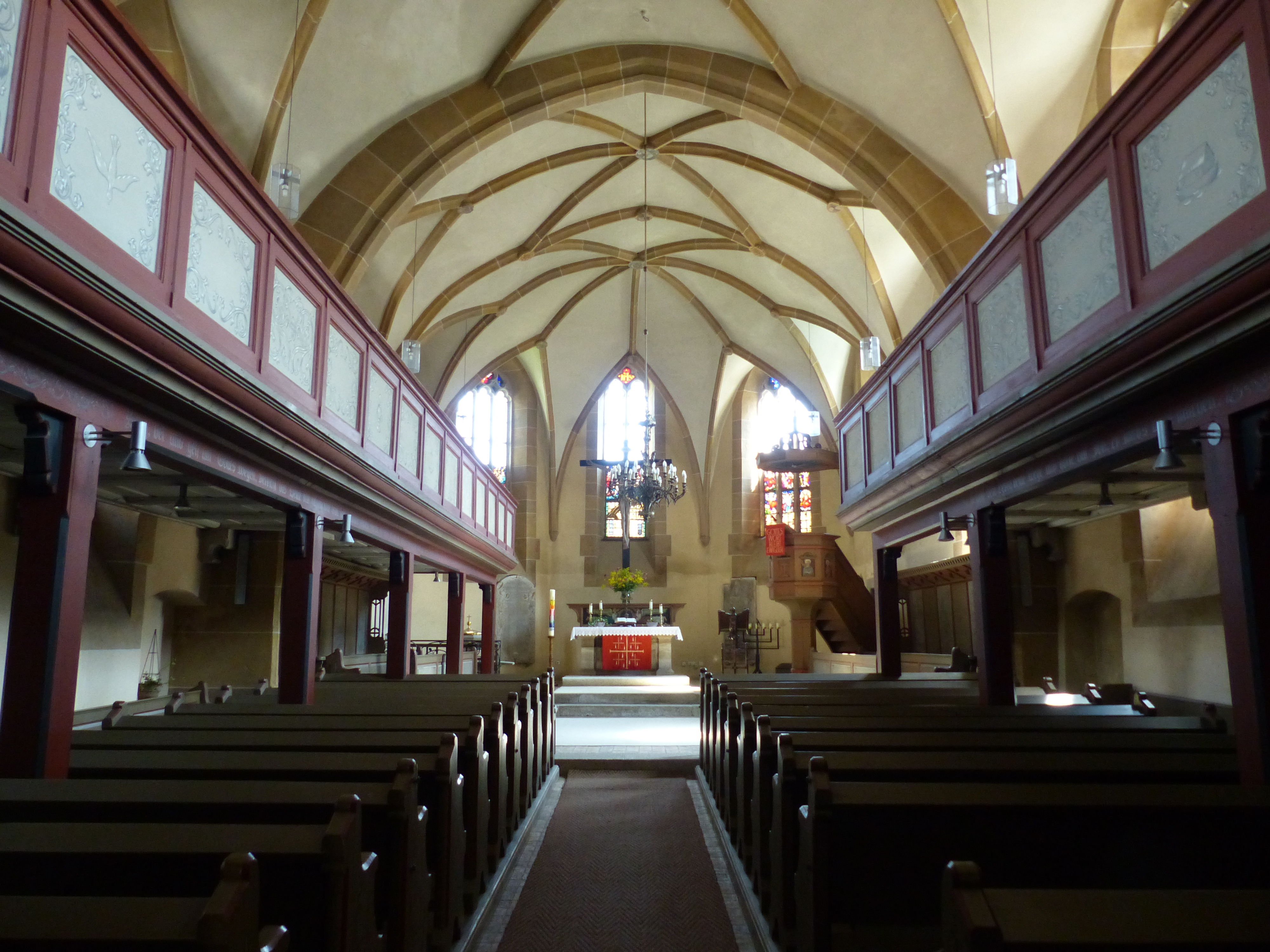 Ansicht eines Baudenkmals im Gemeindegebiet von Konradsreuth, Landkreis Hof